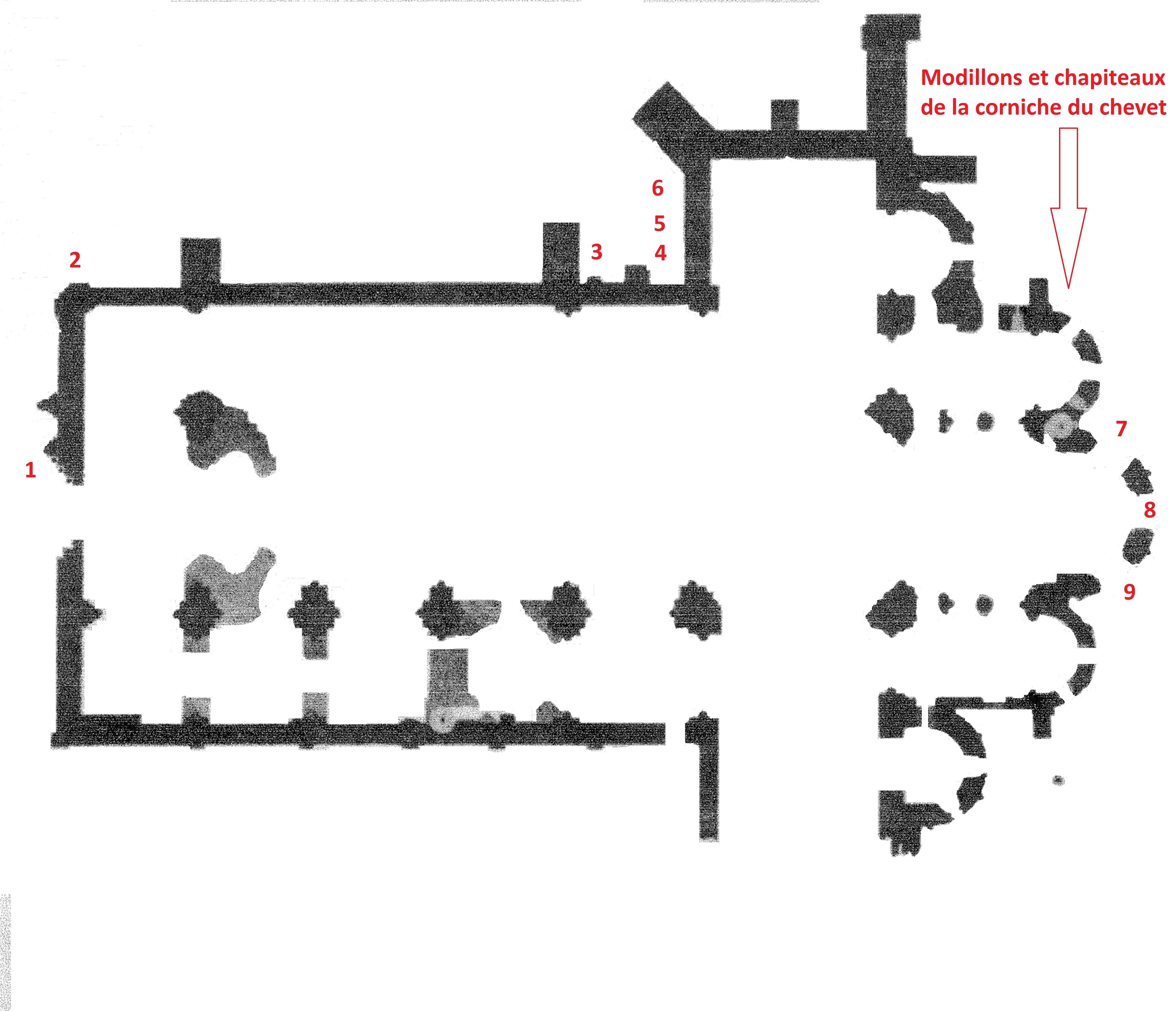 Emplacements des sculptures abbaye de la Sauve-Majeure (Gironde)